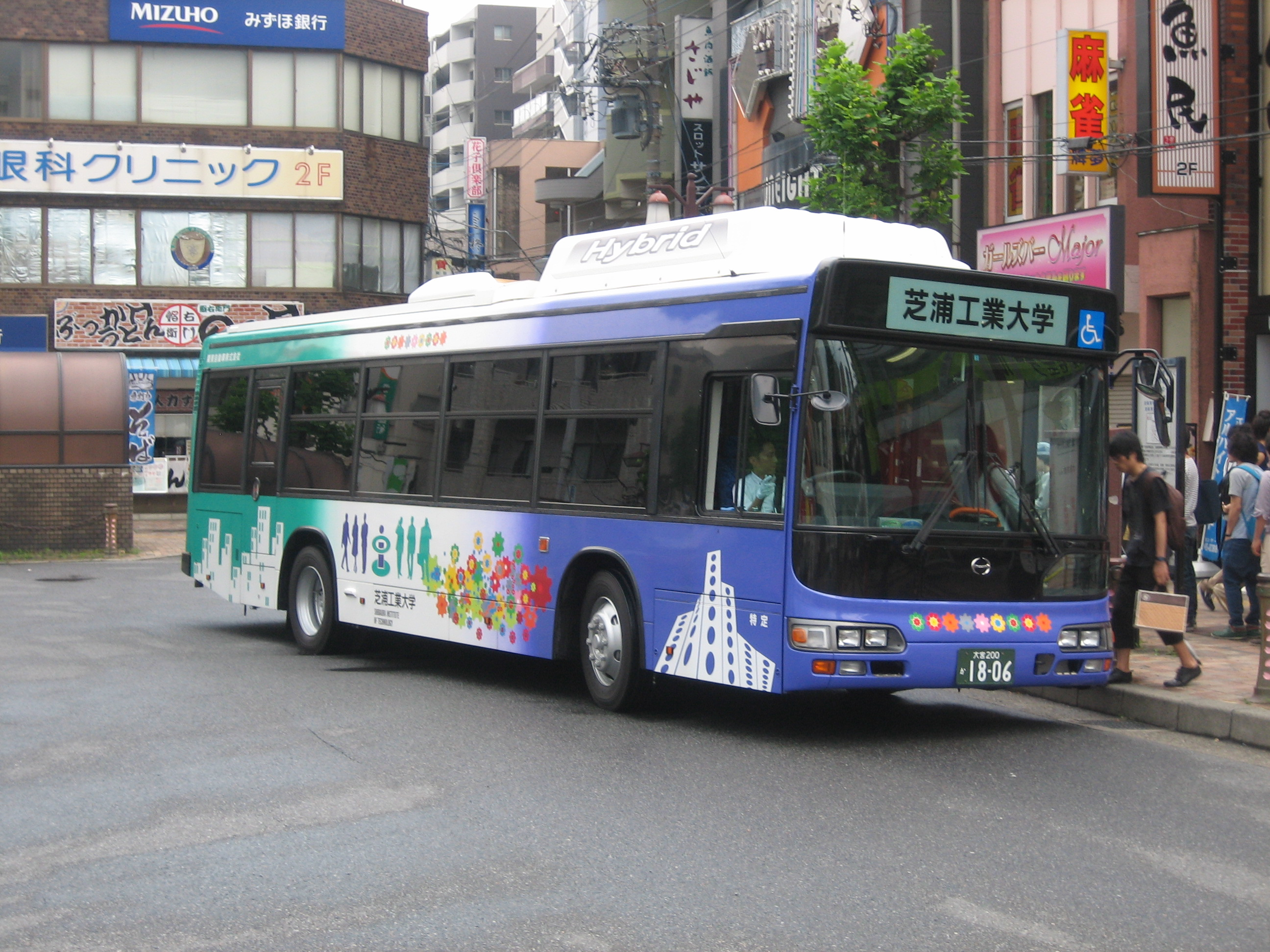 関東自動車が運行する芝浦工大のスクールバスに導入されたハイブリッドバス